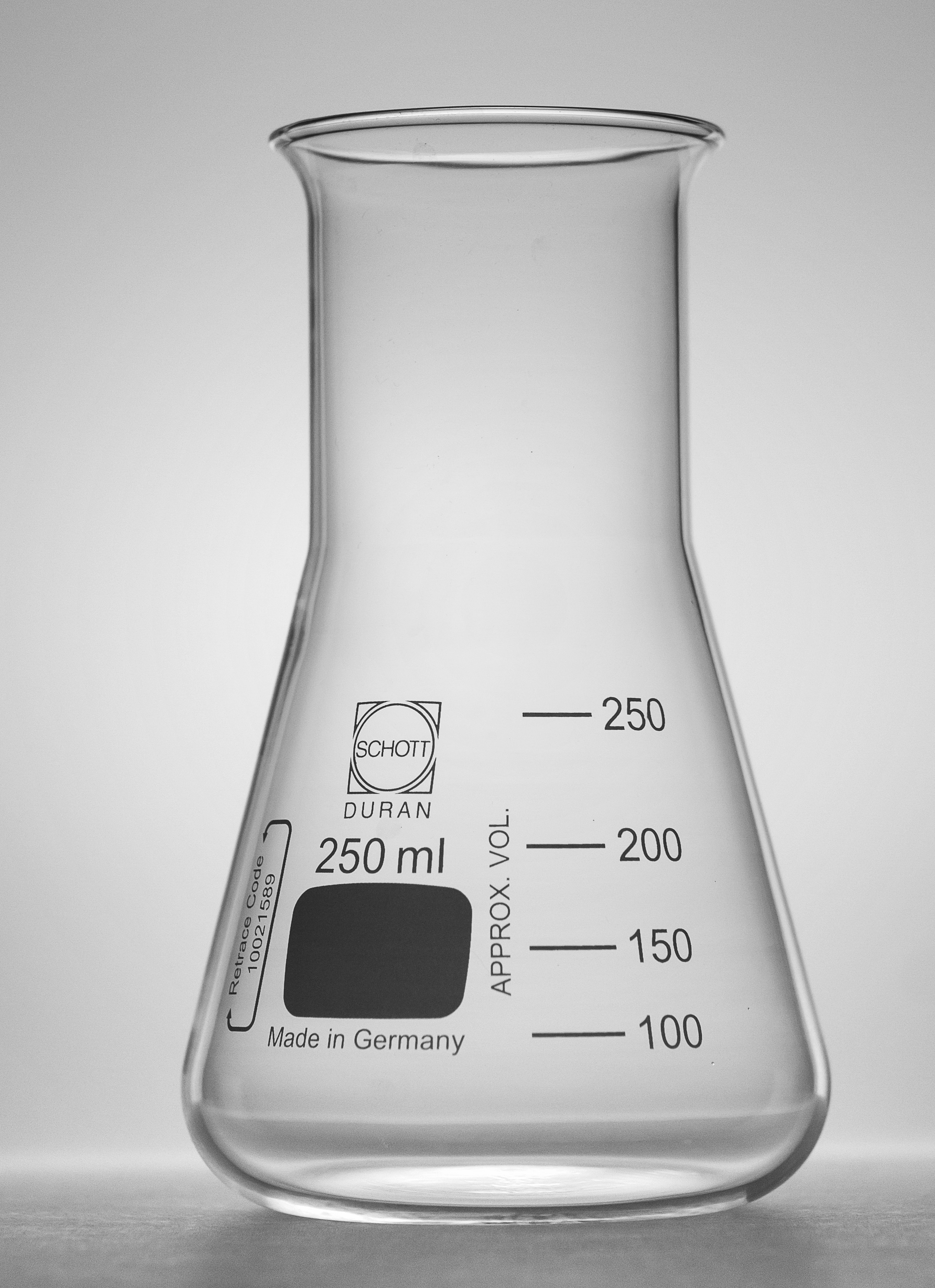 Duran Erlenmeyerkolben weiter Hals 250ml